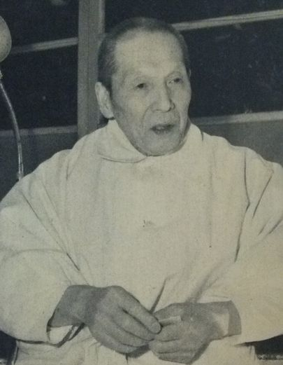 石原忍